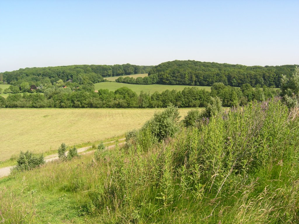 Blick auf Vorbergshügel vom Lärmschutzwall der A1 aus